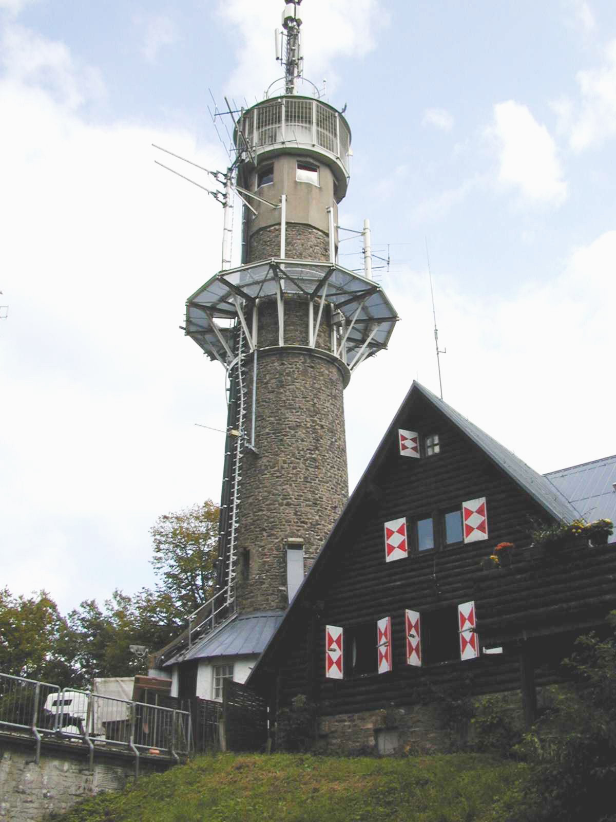 Kindelbergturm 2007